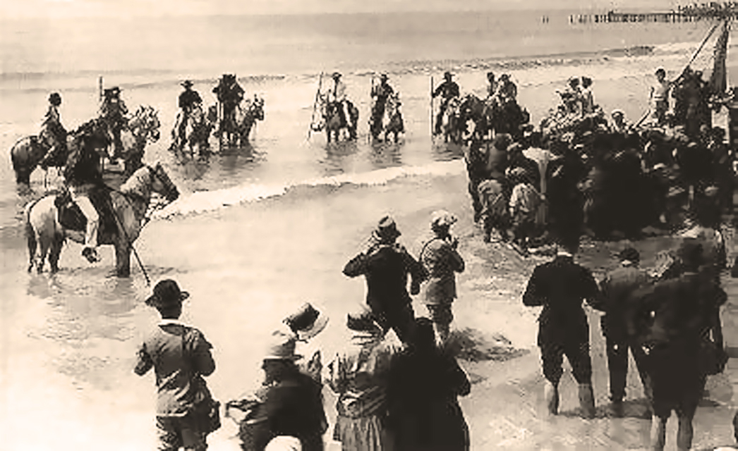 Le 24 mai 1935, pour la première fois, sous l'influence du marquis Folco de Baroncelli, Sarah la Noire, accueillie par les gardians, accompagne les saintes lors du bain rituel